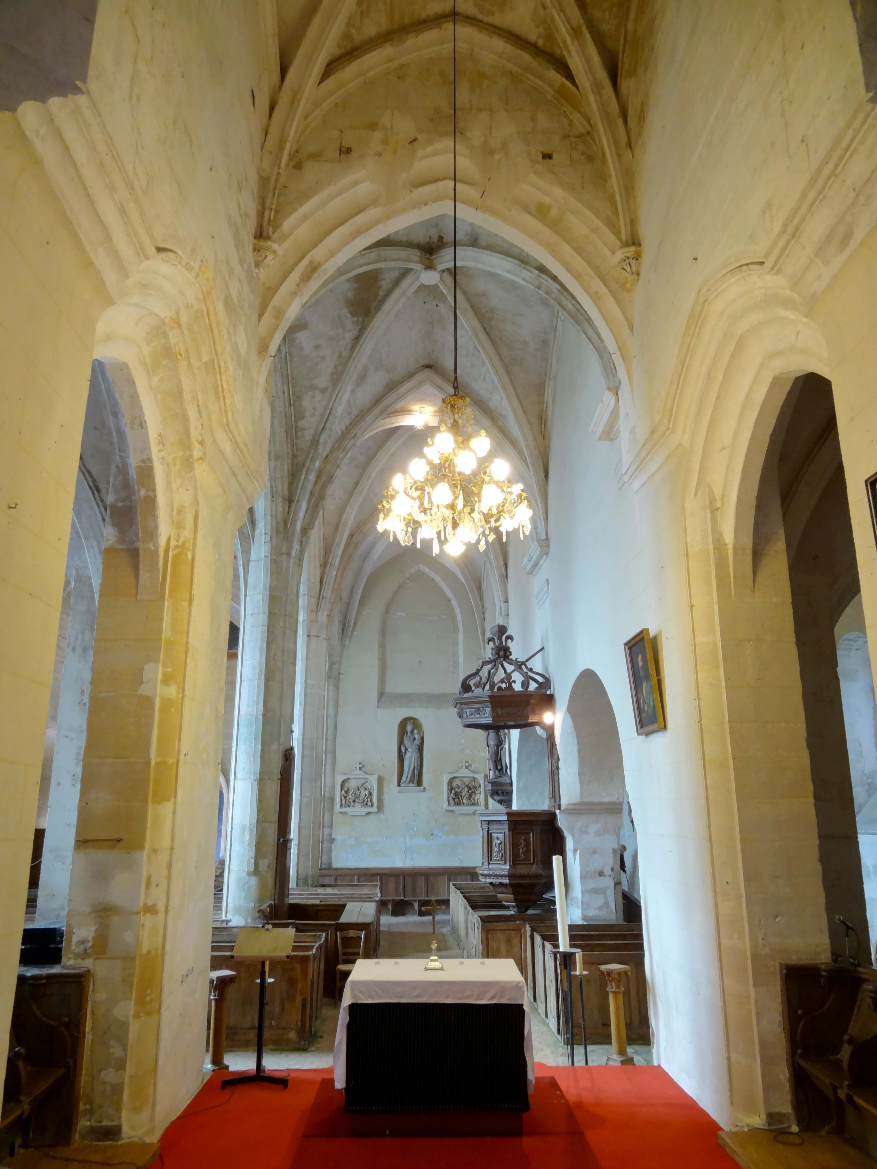 Intérieur de l'église - voir titre.